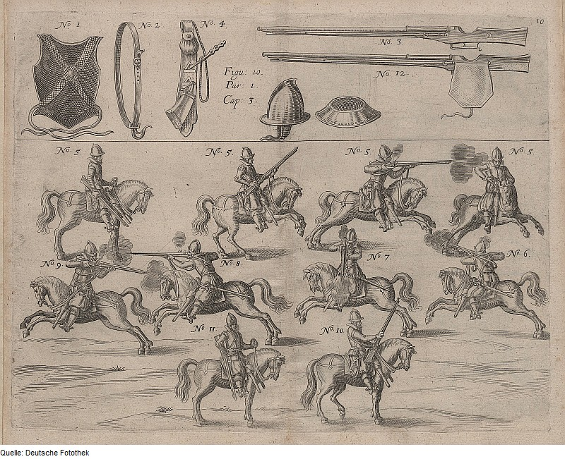 Original image description from the Deutsche Fotothek Kriegskunst & Pferd & Arkebussier & Gewehr & Rüstung